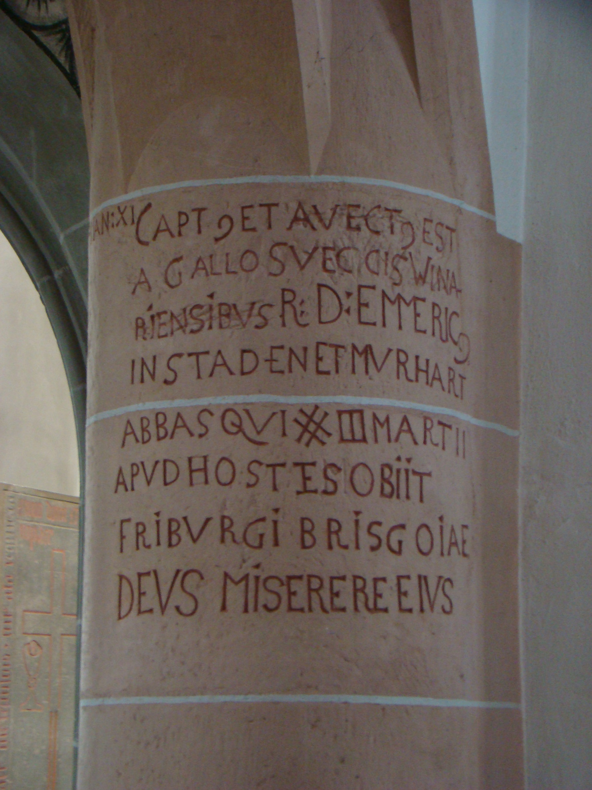 Stadtkirche Murrhardt, Inschrift im südlichen Seitenschiff